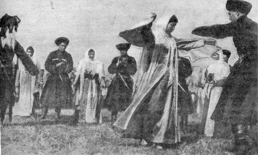 Кабардинський танець // Kabardinian Dance